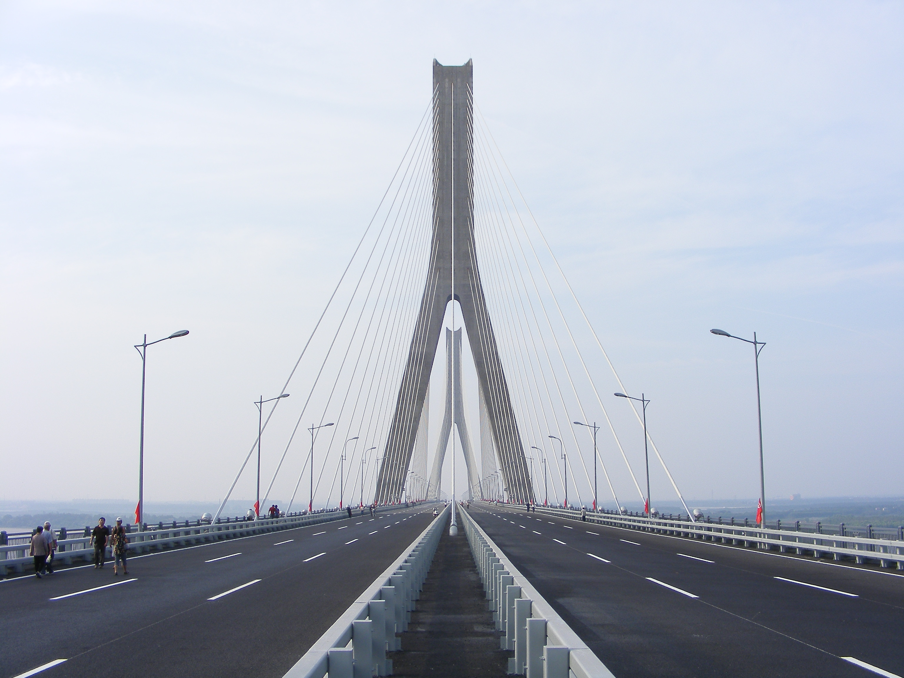 天兴洲大桥